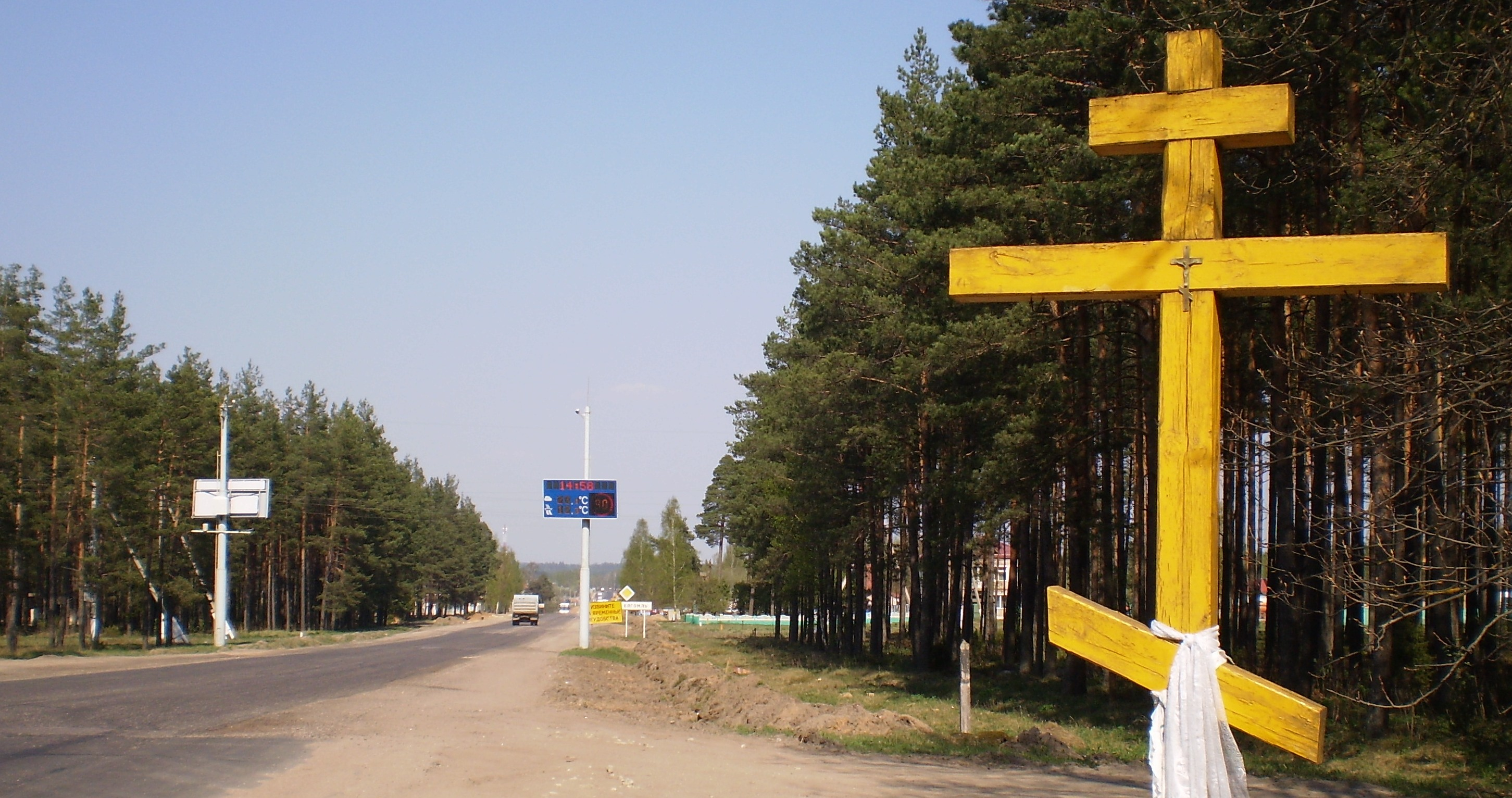 Въезд в Бегомль по трассе Минск-Витебск